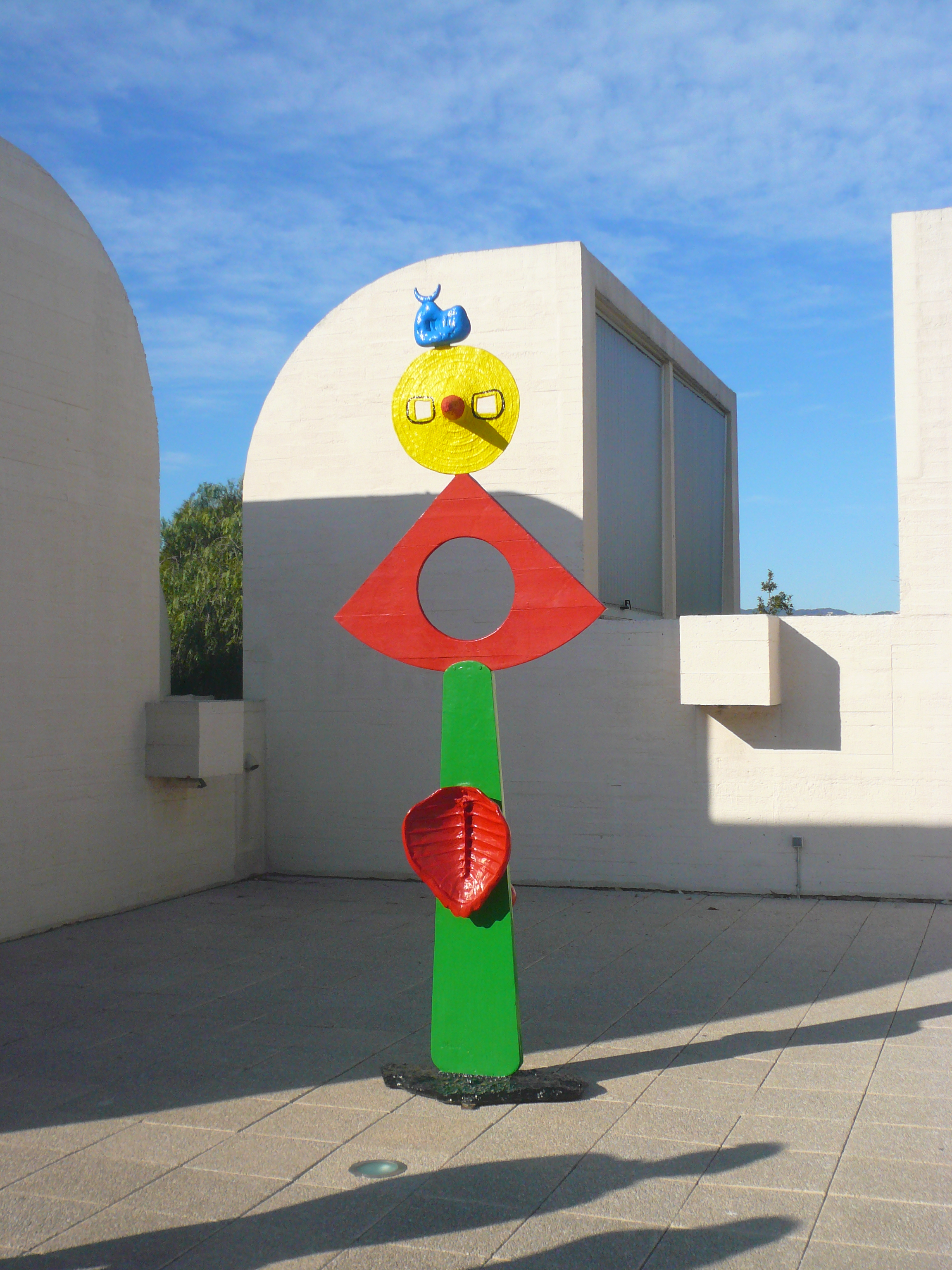 Fundació Miró (Barcelona) Object location41° 22′ 07″ N, 2° 09′ 36″ E